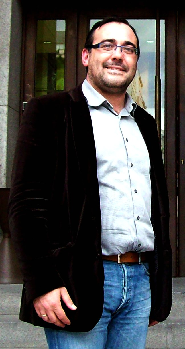 Alcalde de Noia polo PSOE ata 2011